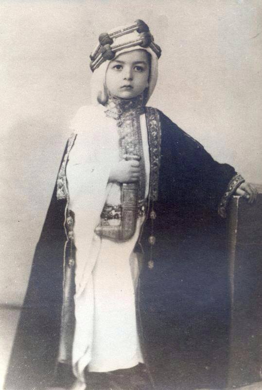 الصورة عام 1931